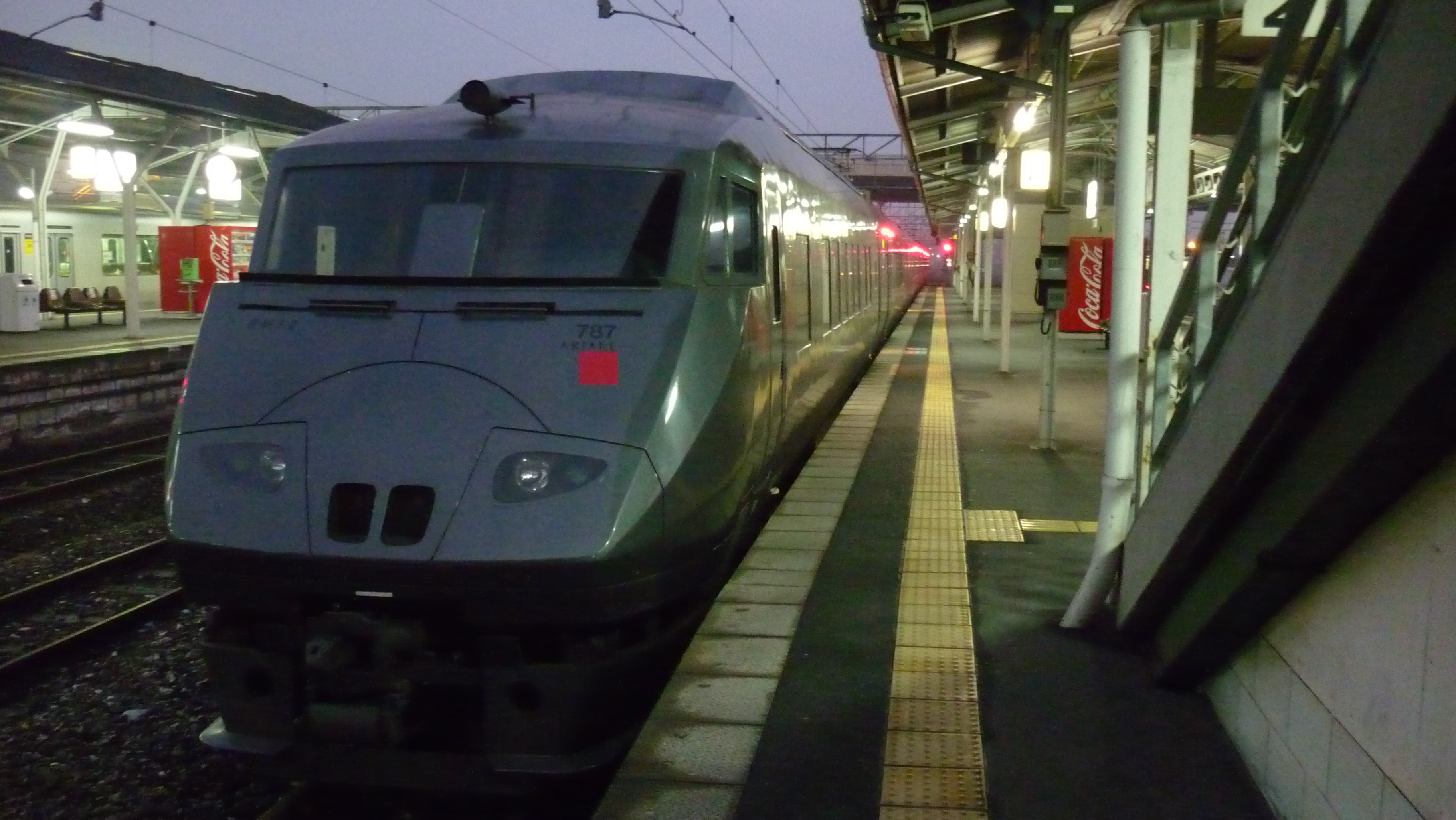 787系特急「かいおう3号」 直方駅にて撮影